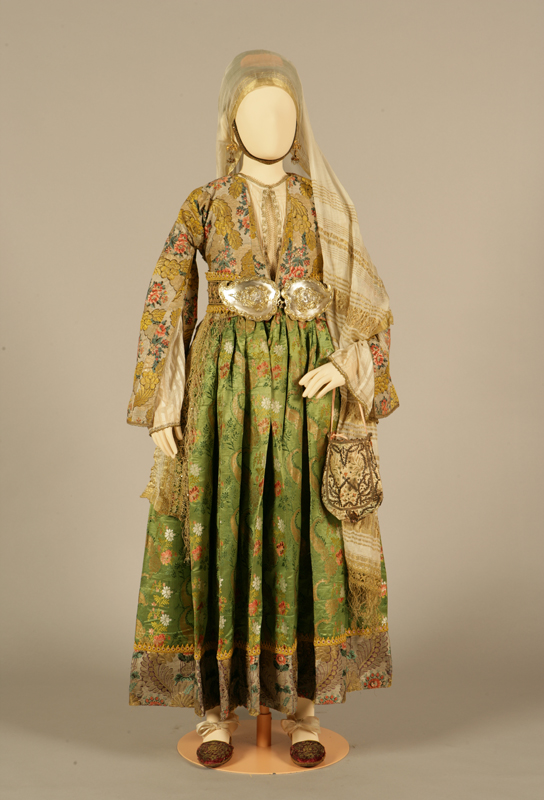 Νυφική φορεσιά παλαιού τύπου Κύμη, Εύβοια. 18ος αιώνας Συλλογή Πελοποννησιακού Λαογραφικού Ιδρύματος, Ναύπλιο